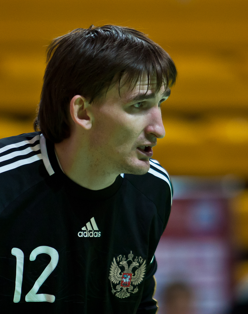 Сергей Зуев защищает ворота сборной России в победном товарищеском матче с Бразилией